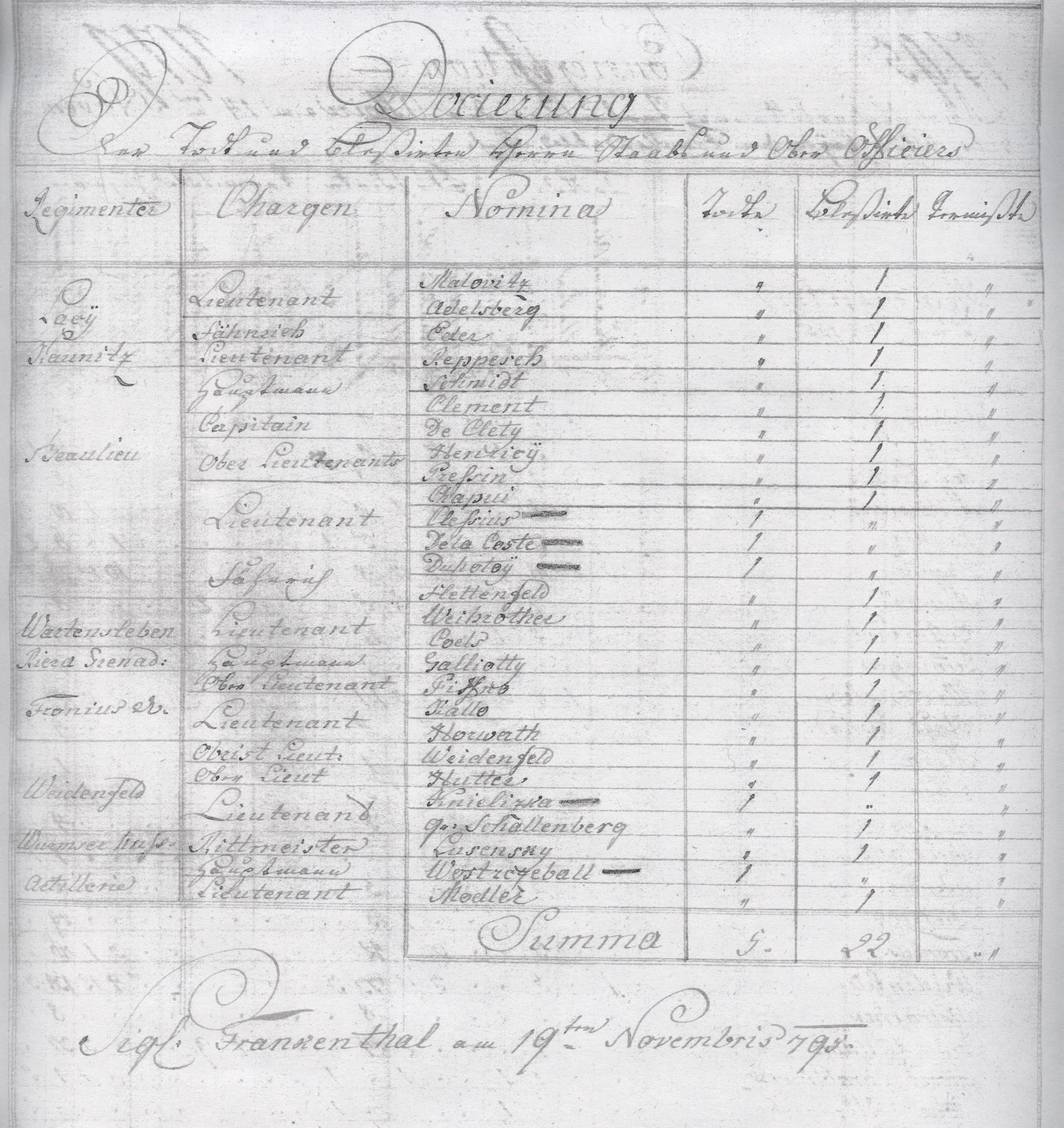 Lambsheim, Deutschland, Rheinland-Pfalz, Verlustliste Offiziere, Gefecht von 1795